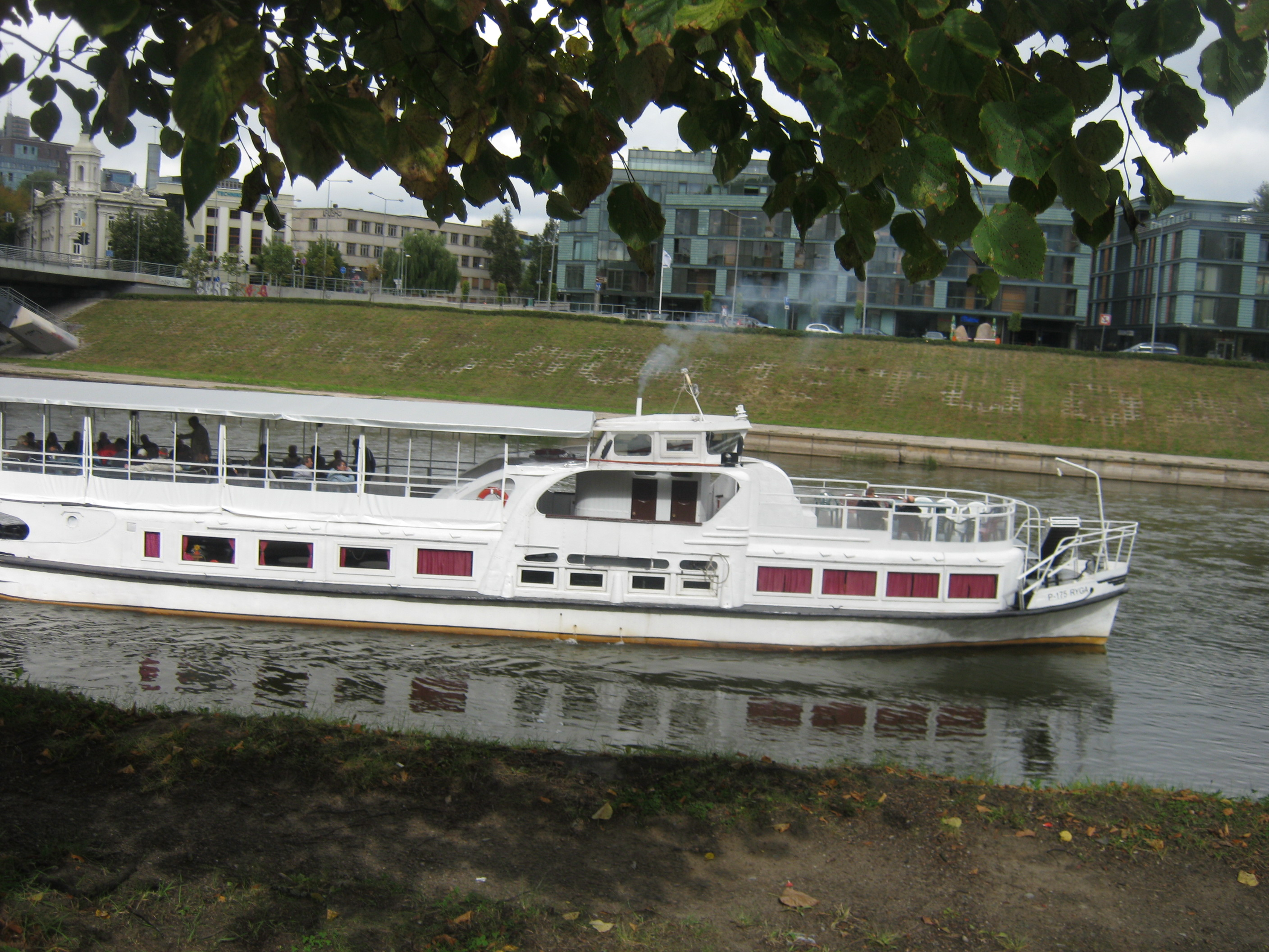 Laivas Vilniuje